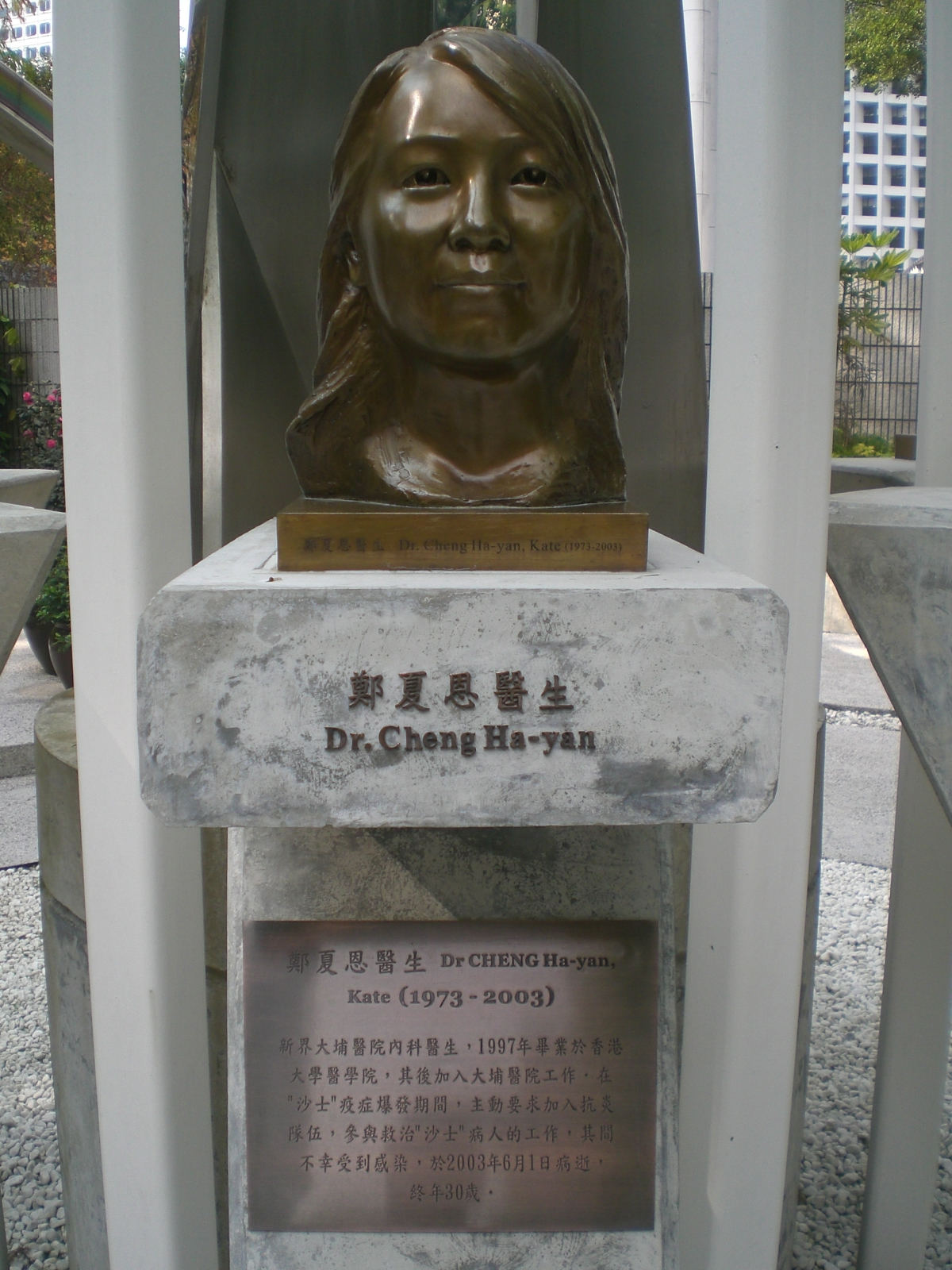 位於香港公園的「雨後彩虹」，是豎立於香港公園太極廊的香港抗疫英雄紀念碑，內有為紀念七位抗疫英雄而設立的銅像。 鄭夏恩醫生